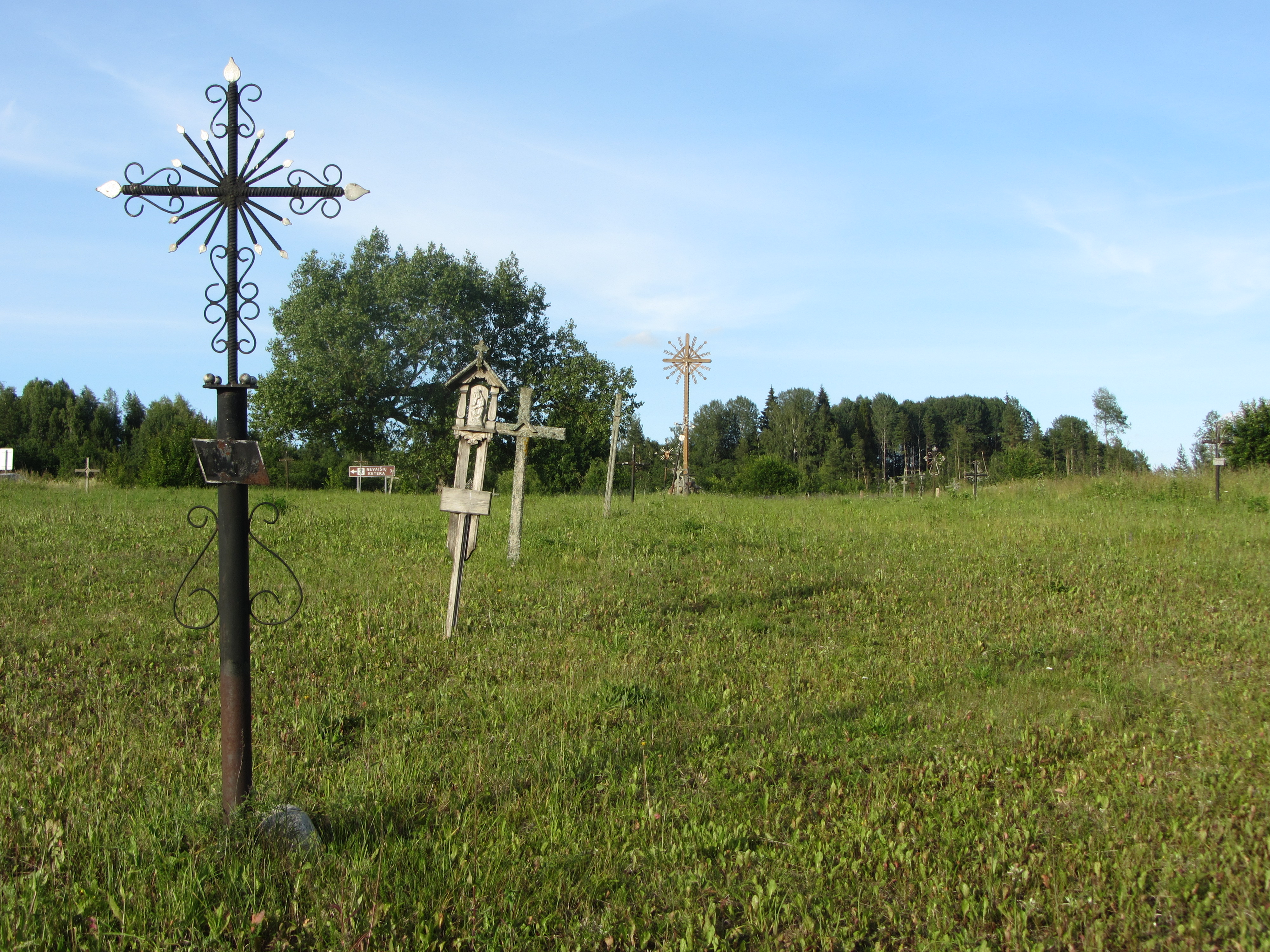 Ceikinių sen., Lithuania